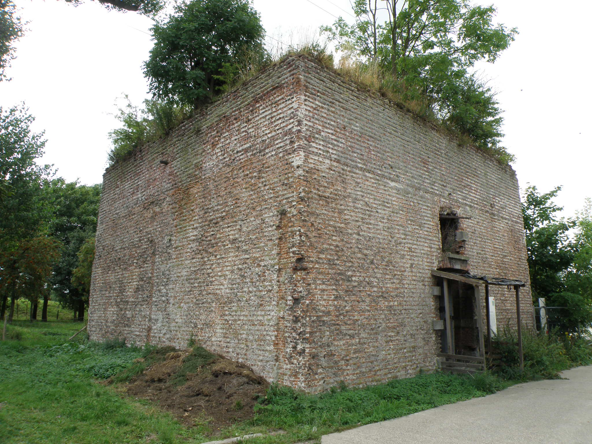 Fort Liefkenshoek, op linker Scheldeoever, gem. Beveren, prov. Oost-Vlaanderen. Kruitmagazijn.